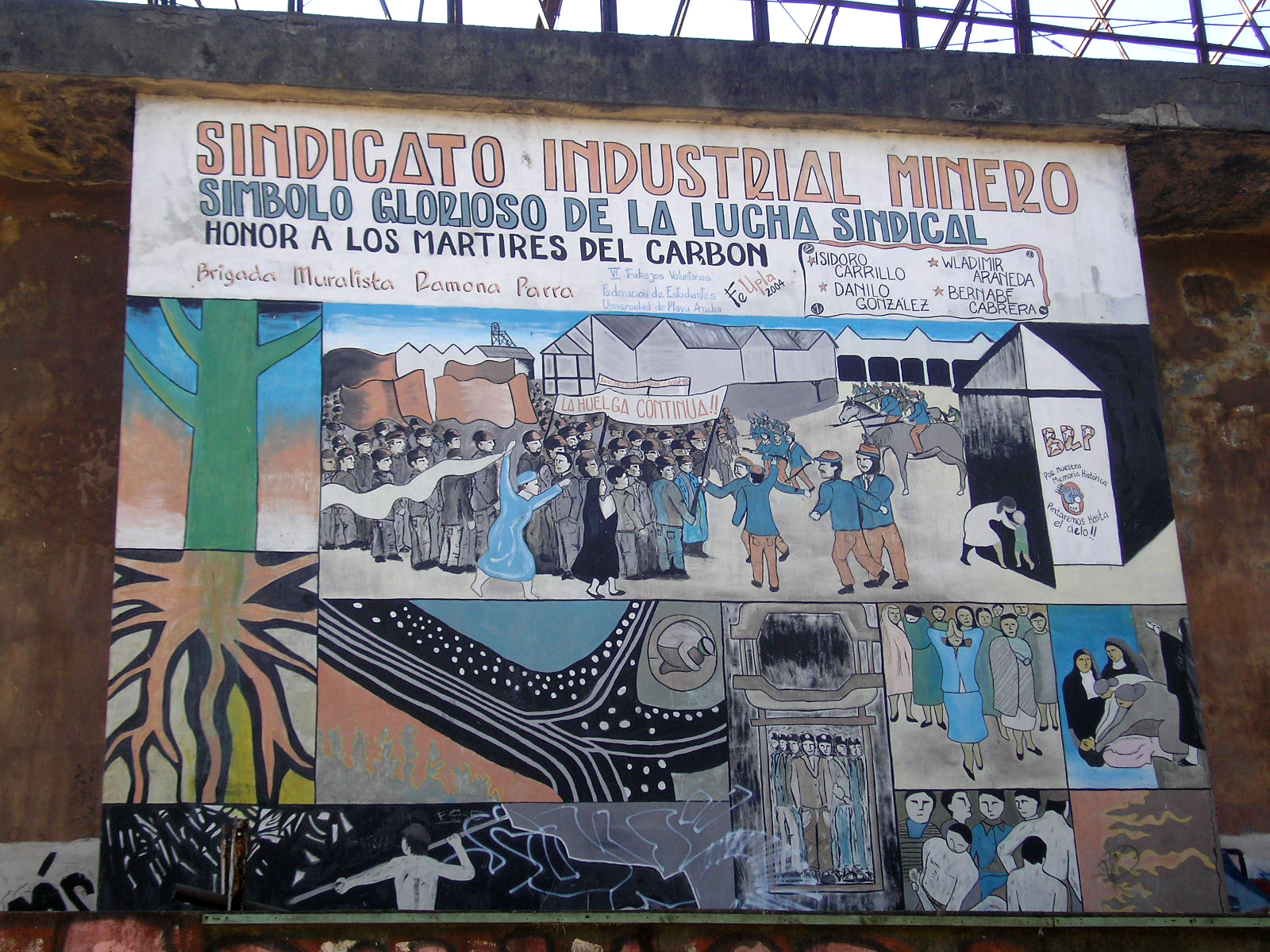 Teatro del Sindicato Nº 6 (Teatro de los Mineros de Lota) This is a photo of a national monument in Chile: 2123